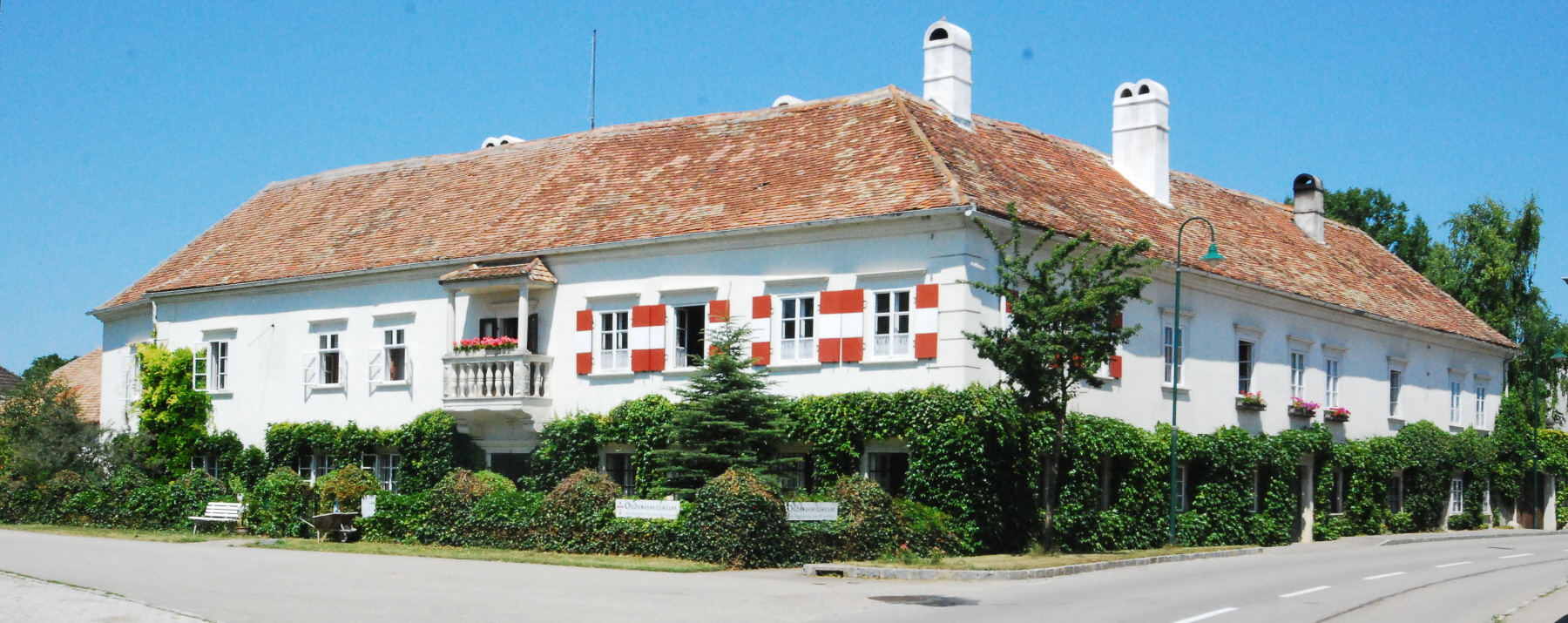 Schloss in Zogelsdorf in Niederösterreich